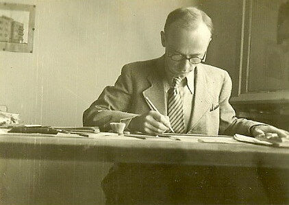 אדריכל יצחק בונה